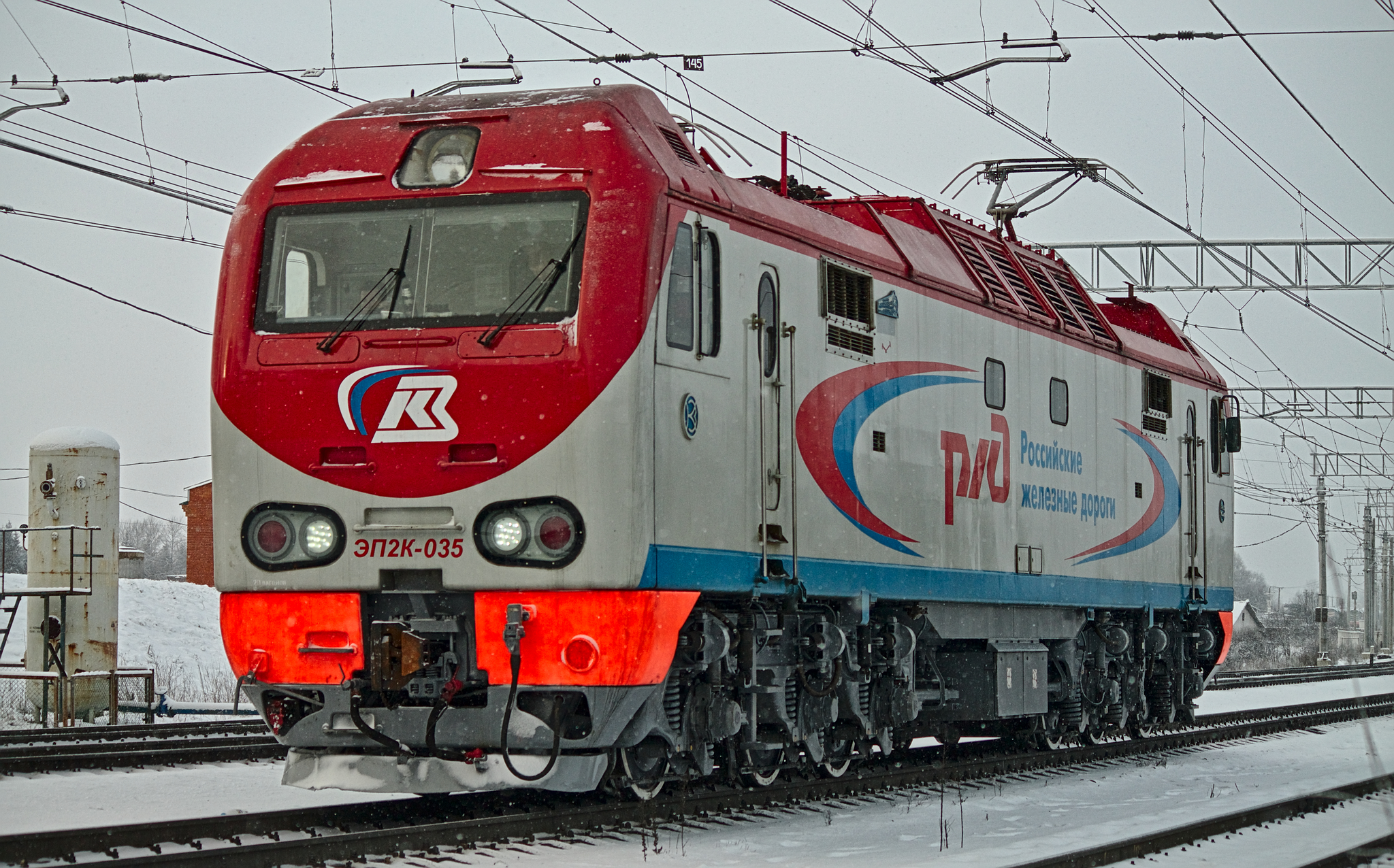 ЭП2К-035, Гатчина-Западный парк. см. фото 575375 в альбоме автора